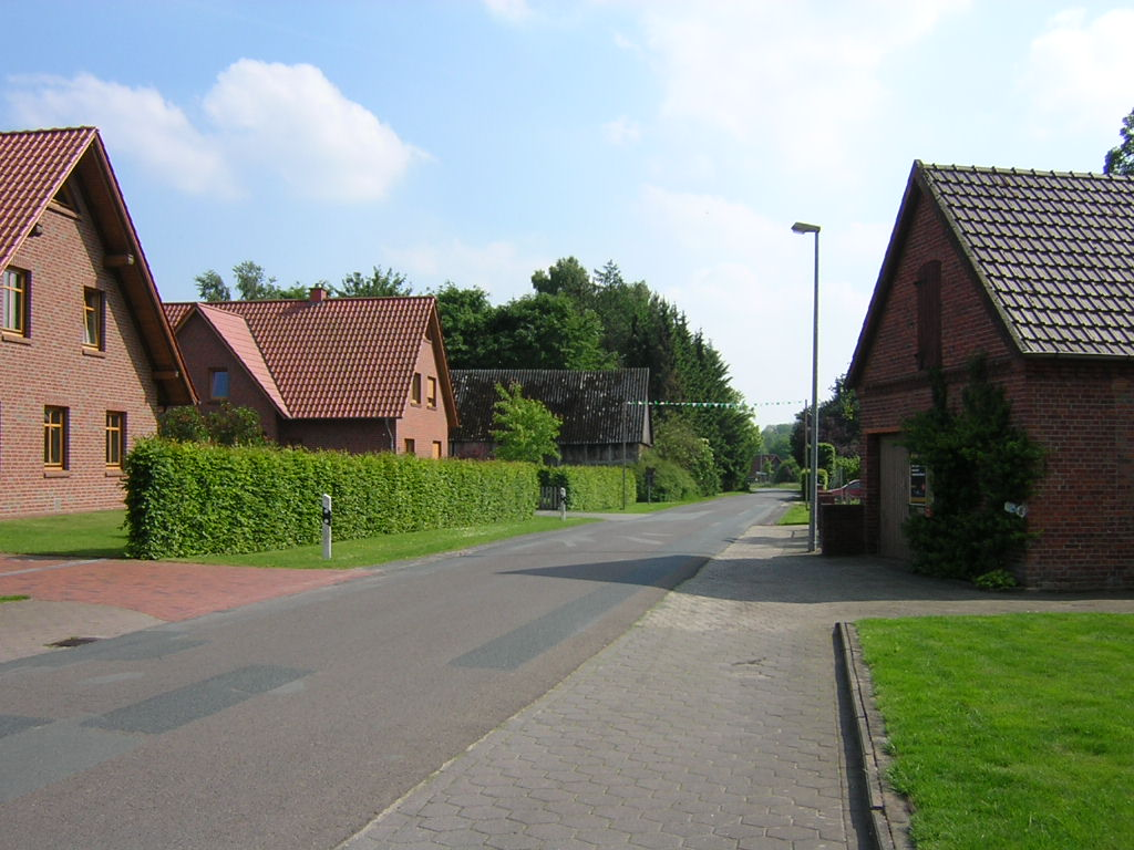 Albringhausen Mitte